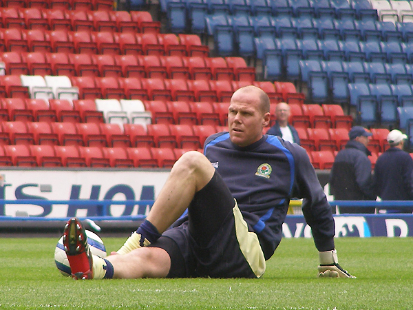 Simon Gray, Fermanagh